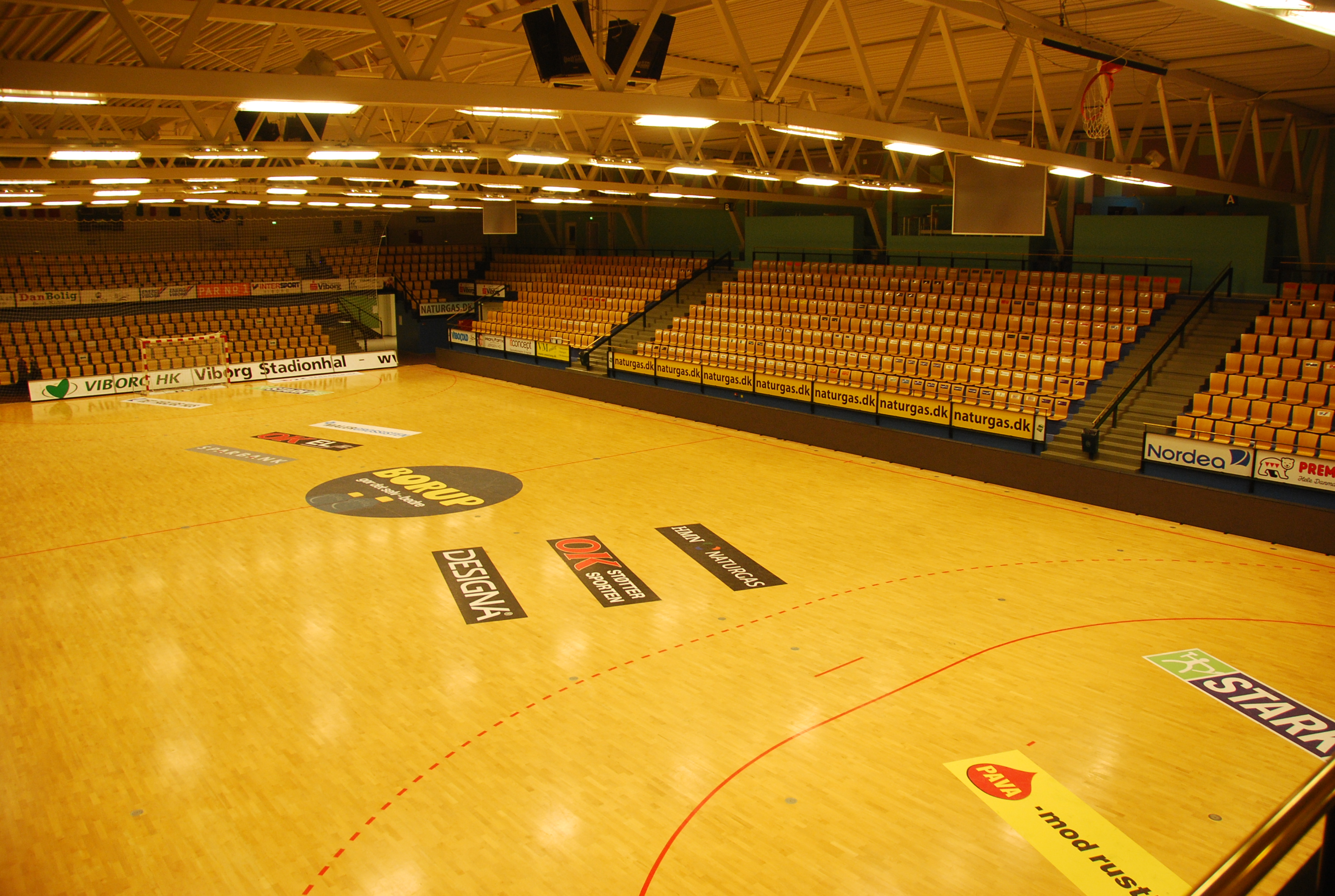 Viborg Stadionhal, hjemmebane for Viborg Håndboldklub.